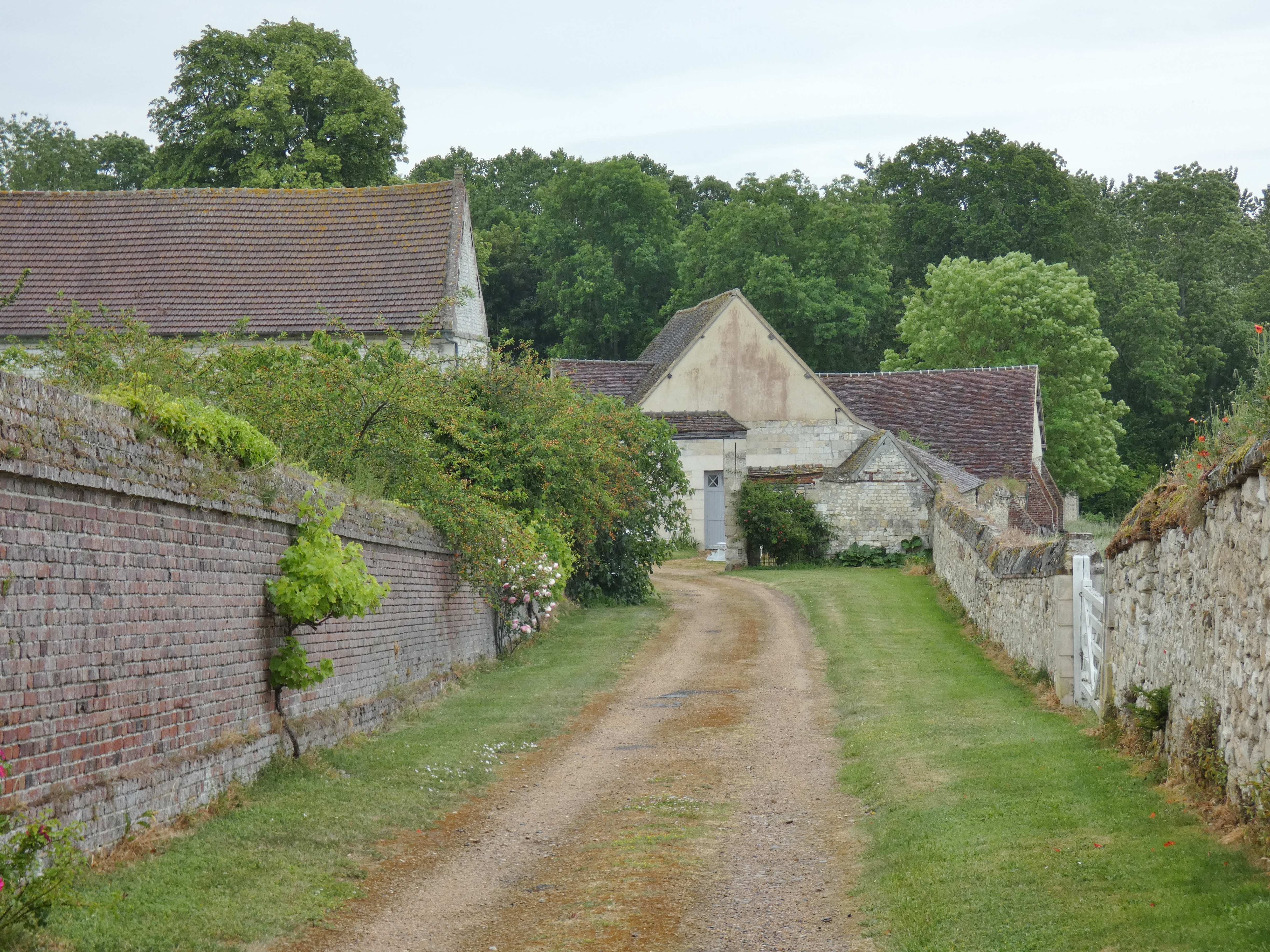 Ancien bâtiments conventuels du prieuré de Wariville, à Litz